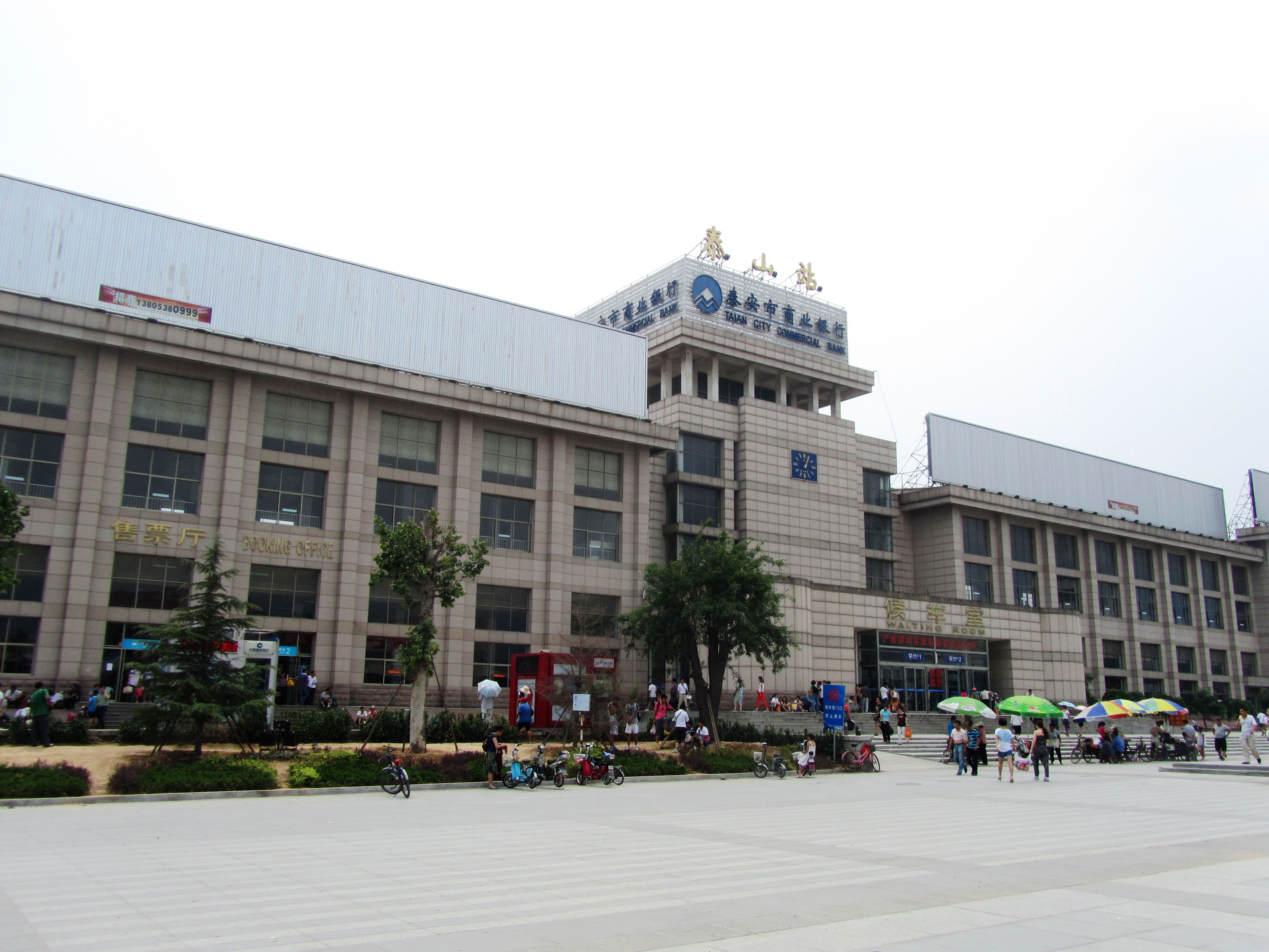 泰安市火车站泰山站。